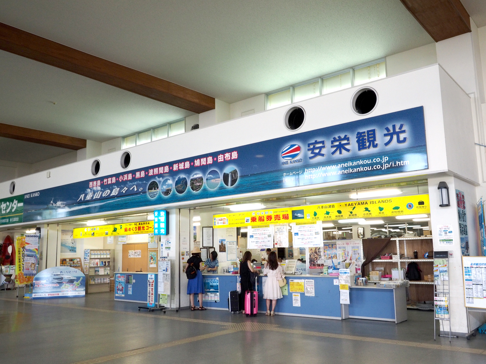 安栄観光事務所（沖縄県石垣市・石垣港離島ターミナル）